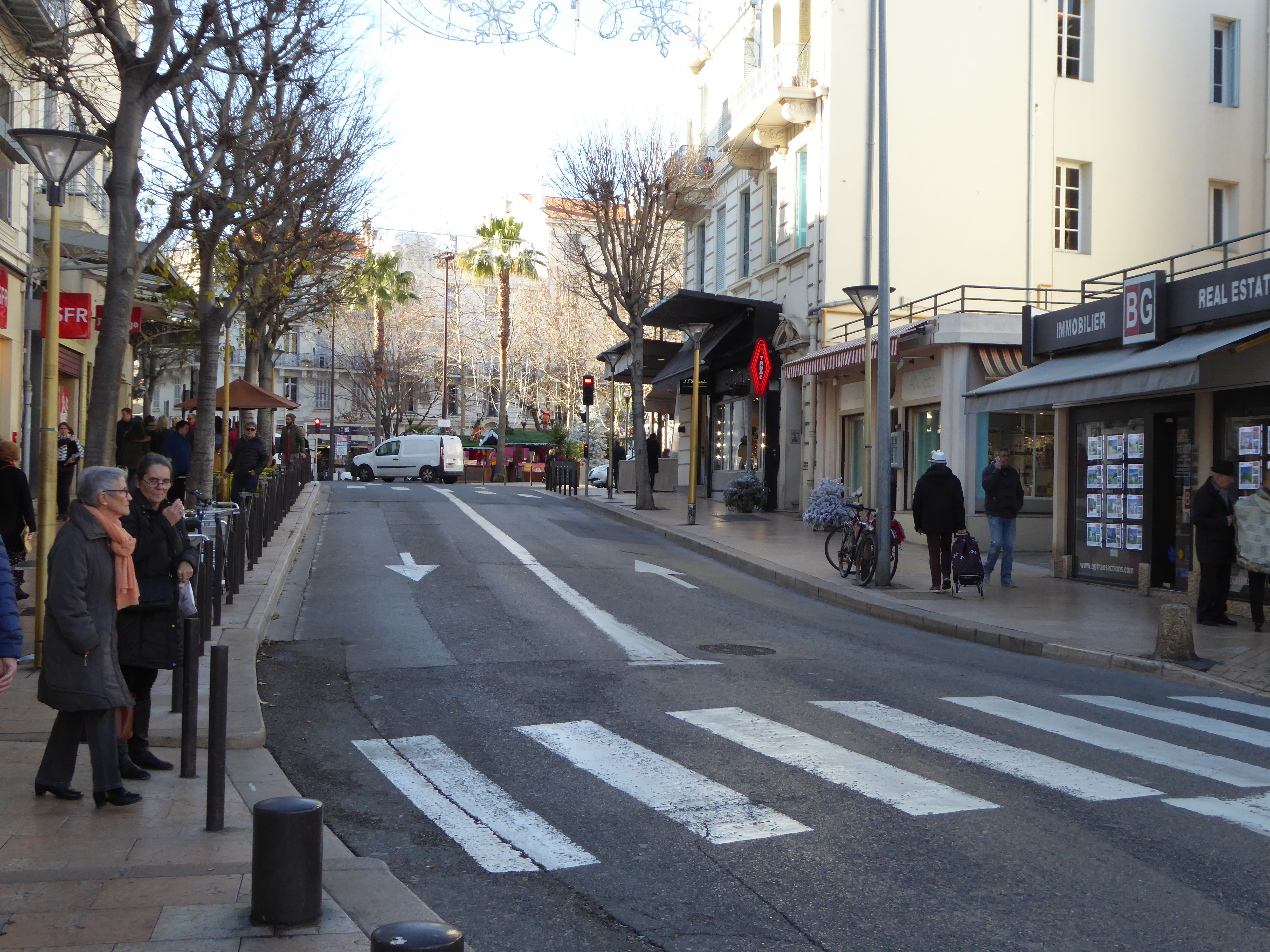 streets in Antibes